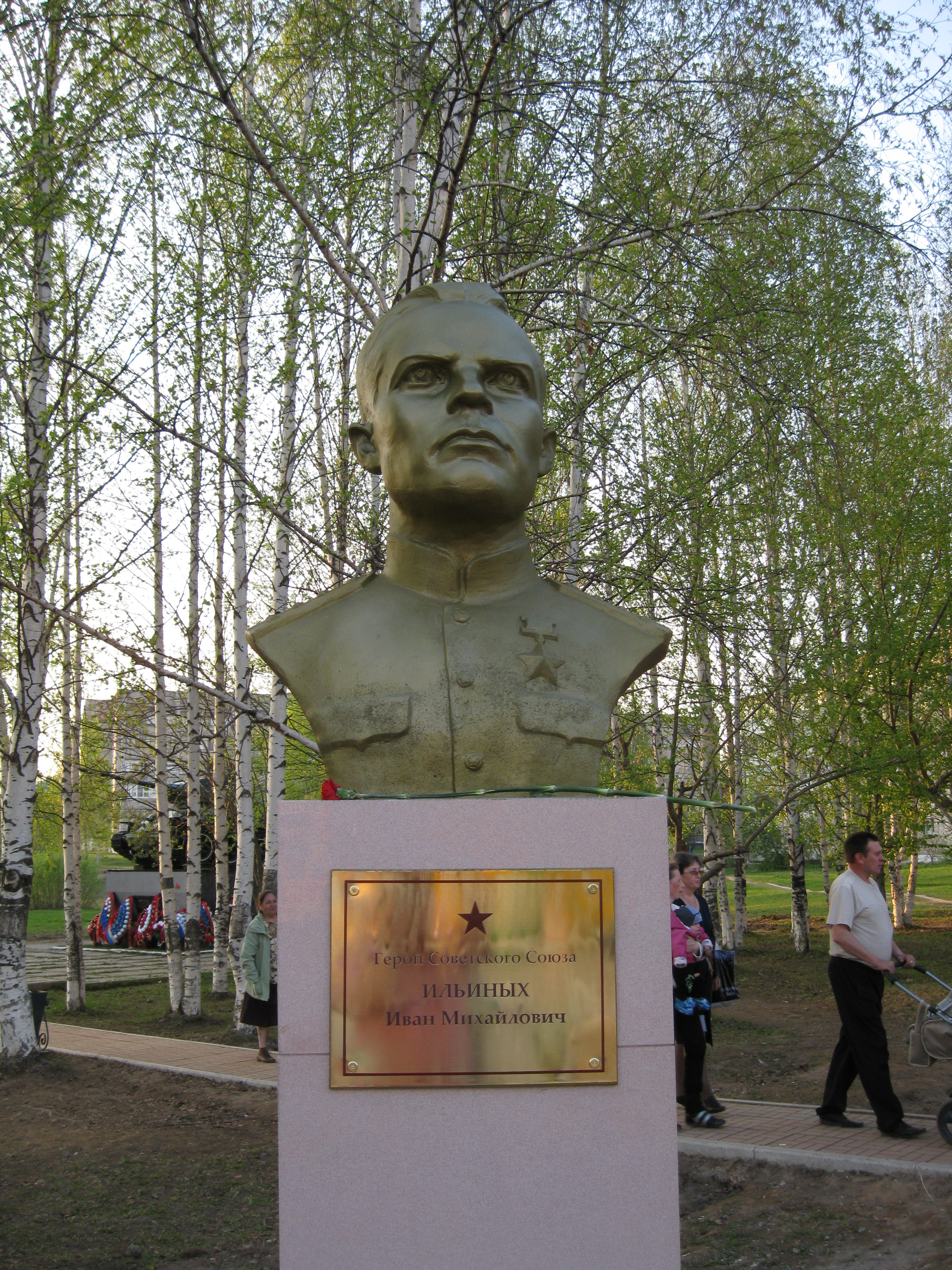 Бюст Ивана Михайловича Ильиных на Аллее Славы, открытой 09.05.2010 года в городе Чернушка.